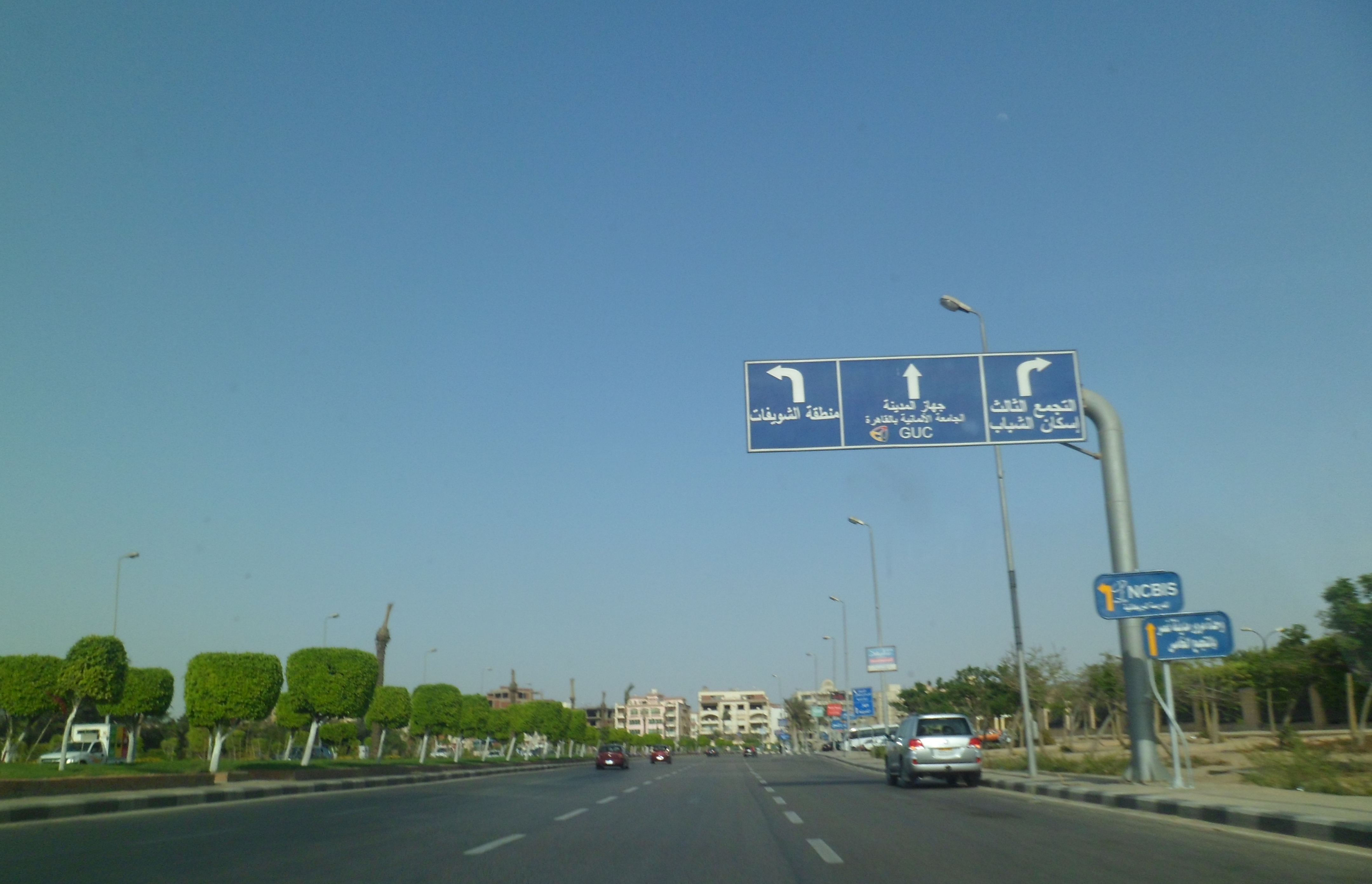 القاهرة الجديدة